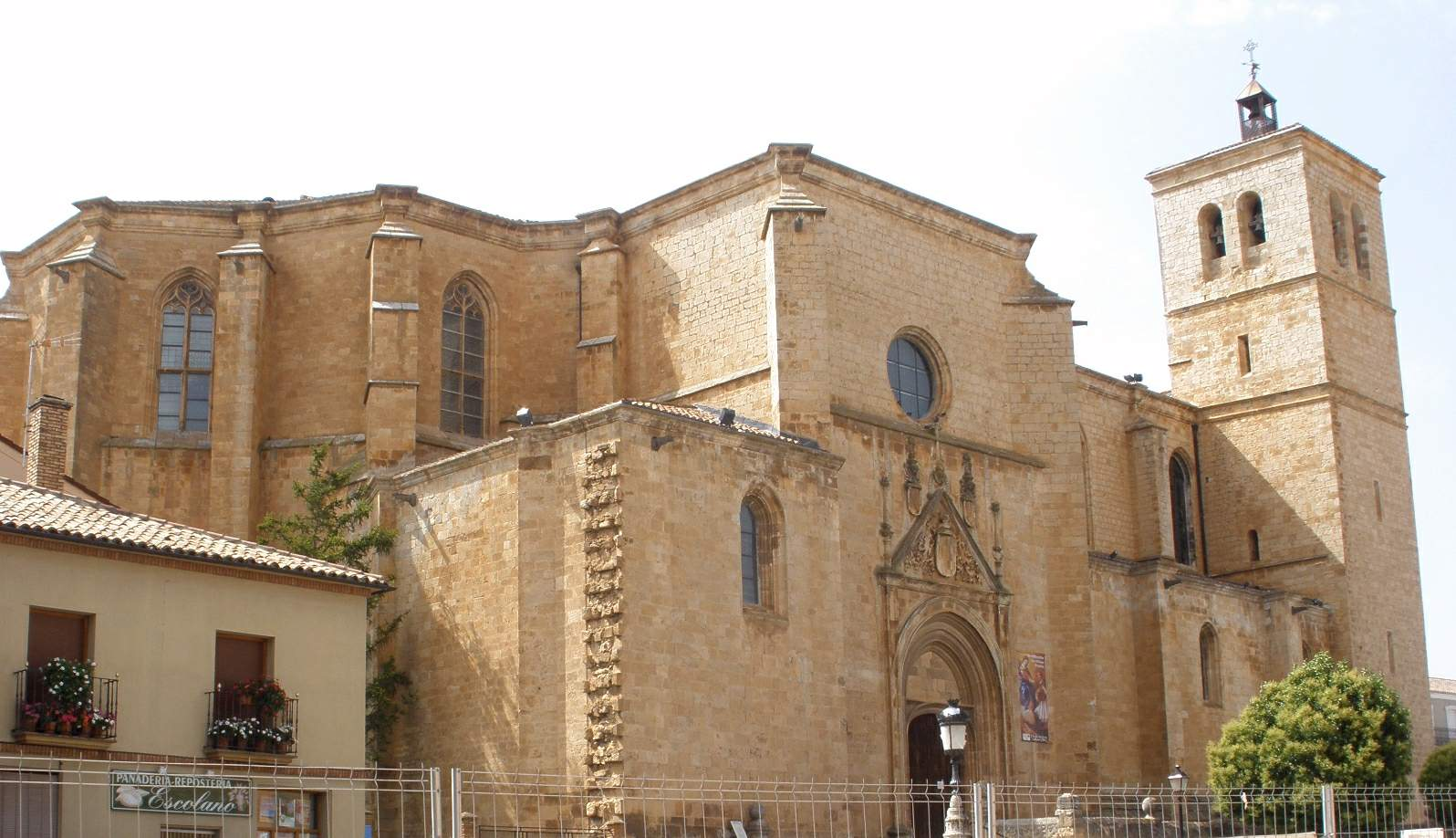 Berlanga de Duero (Soria) - Colegiata de Santa Maria del Mercado